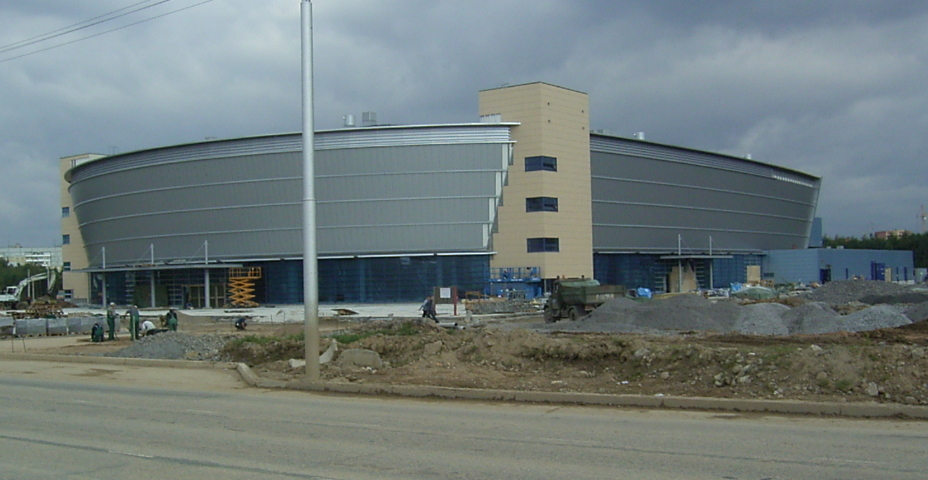 ледовыйДВОРЕЦ